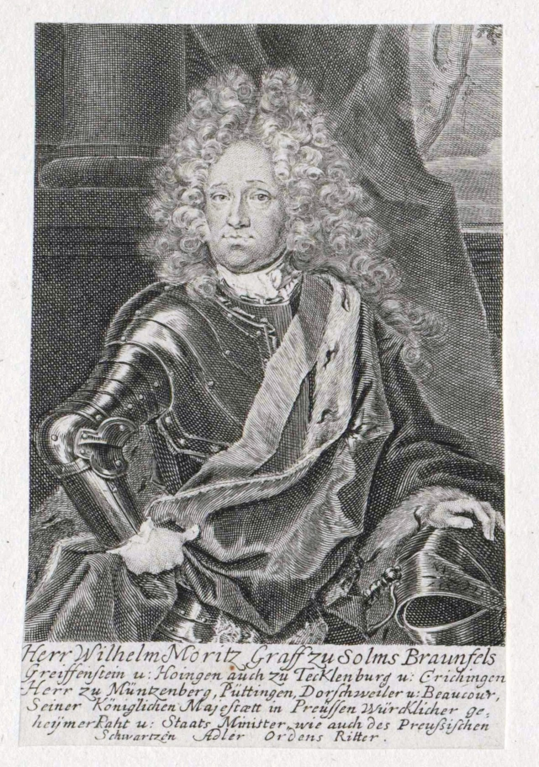 Wilhelm Moritz (1651—1724), Graf zu Solms, Braunfels, Greifenstein und Hungen, auch zu Tecklenburg und Crichingen, Herr zu Münzenberg, Püttingen, Dorschweiler und Beaucour; königlich-preußischer Wirklicher Geheimer Rat und Staatsminister, Ritter des Schwarzen Adler-Ordens